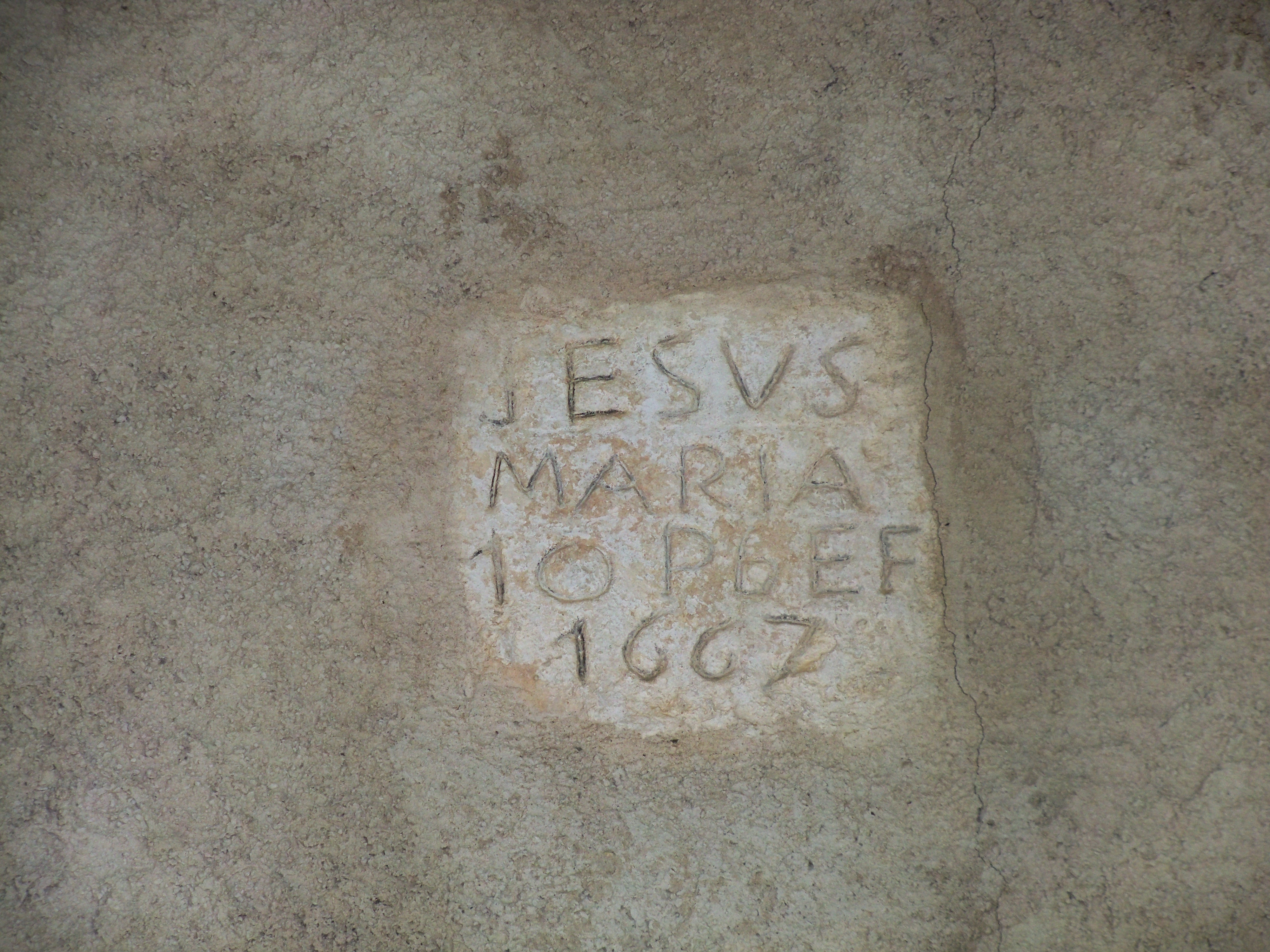 pierre en réemploi à la Chapelle Notre Dame de Lamaron, Lagarde d'Apt, Vaucluse, France